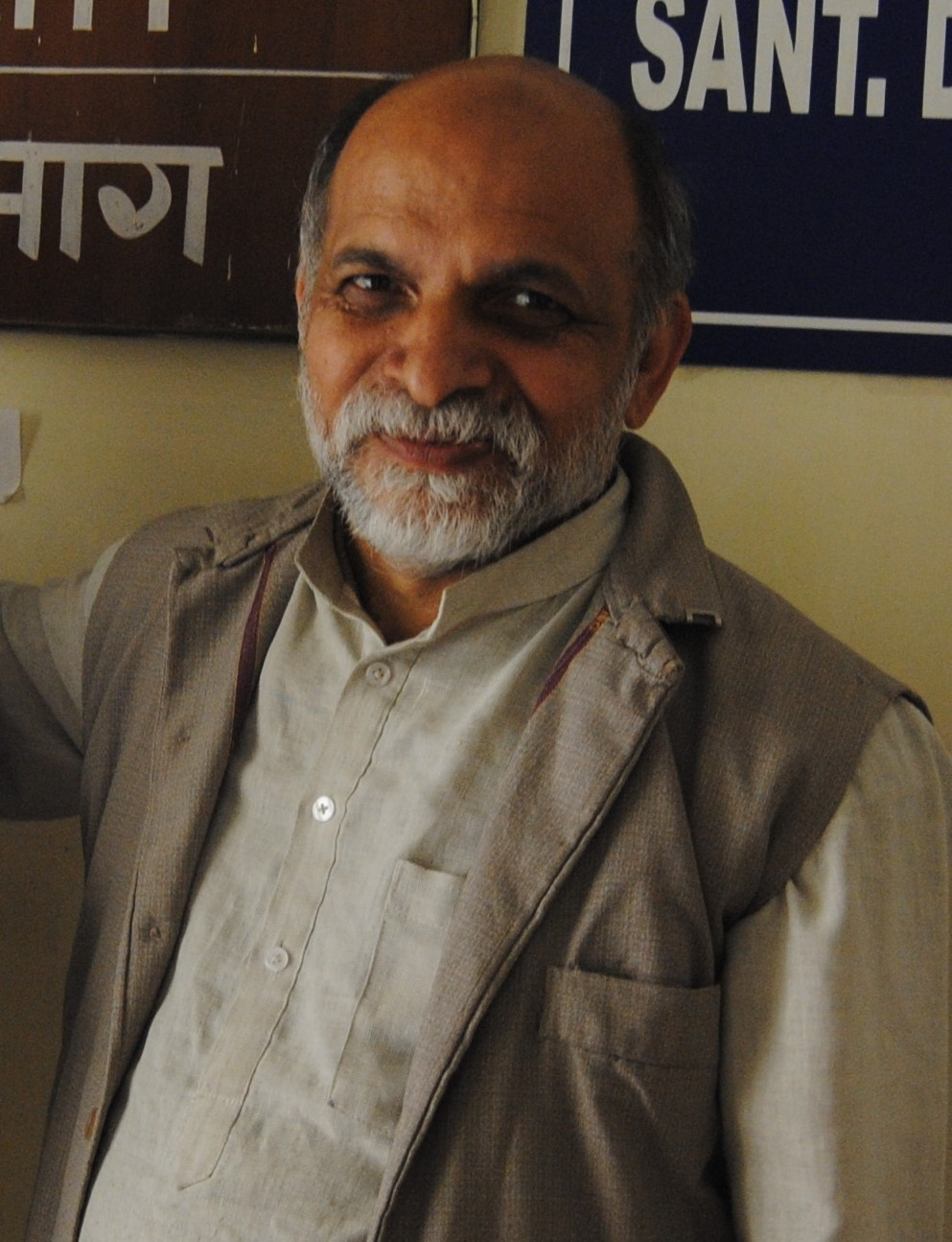 प्रदीप प्रभाकर गोखले